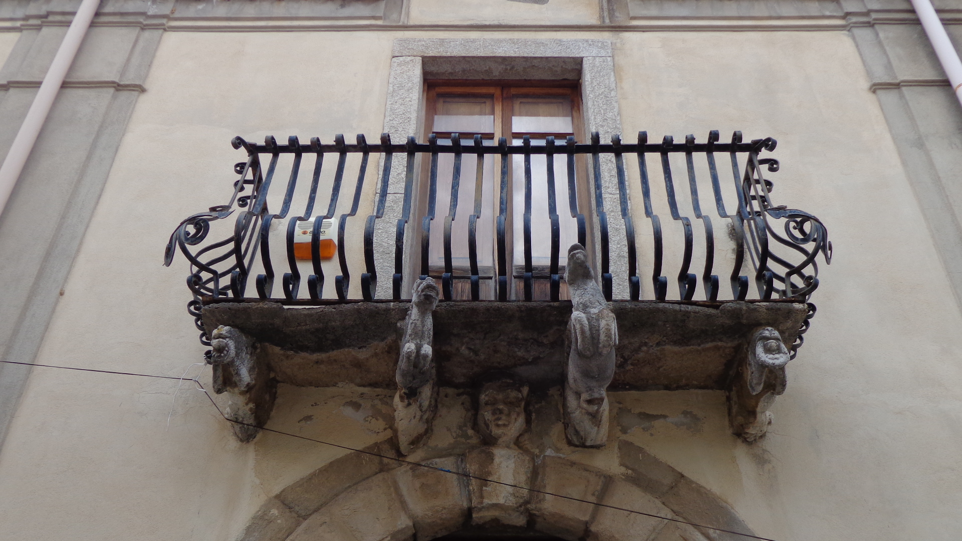 Balcone barocco museo civico di Castroreale